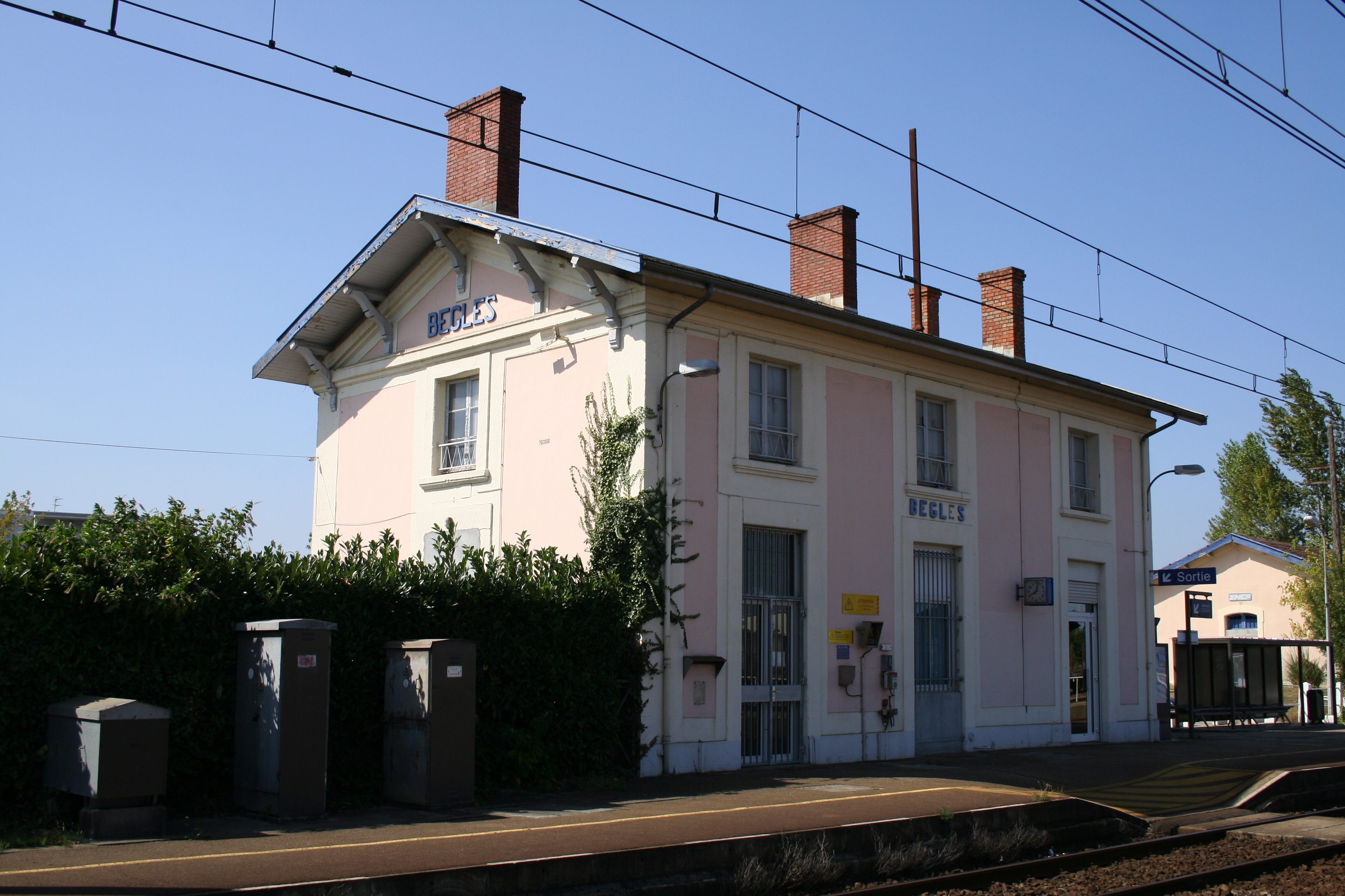 Façade coté quais